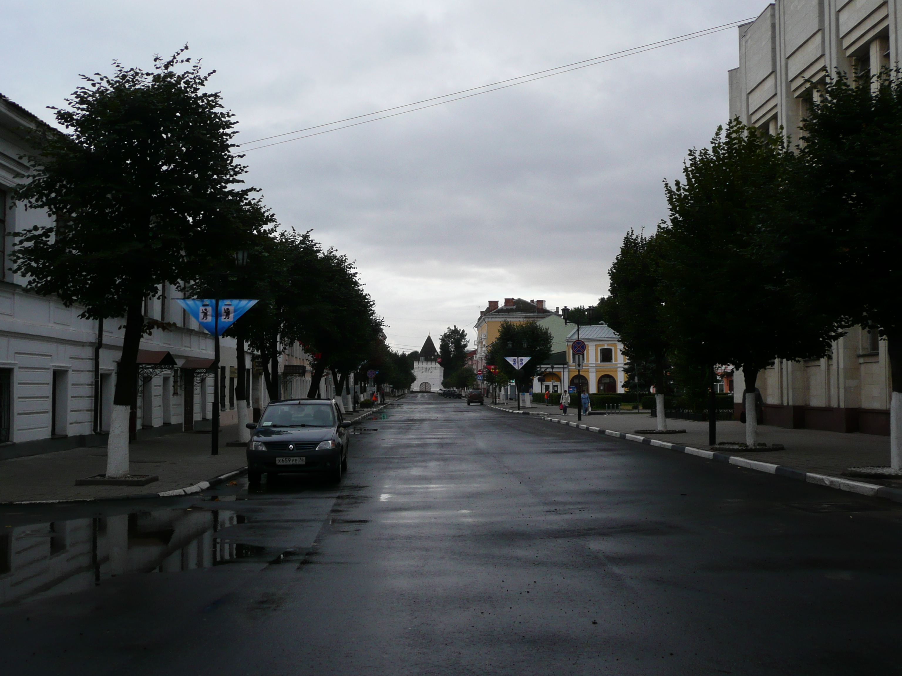 Улица Нахимсона (бывш. Большая Рождественская)